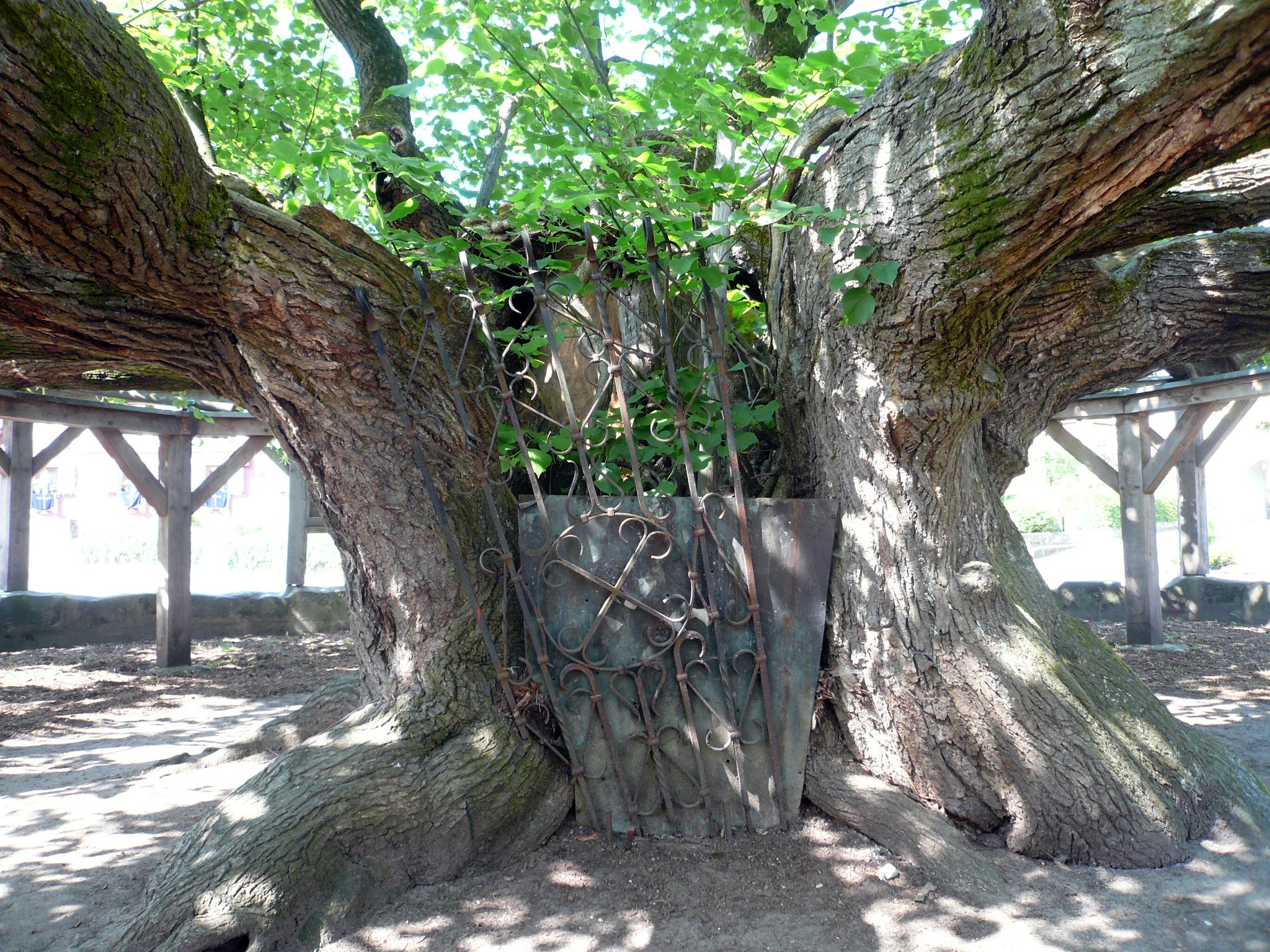 Tanzlinde in Effeltrich